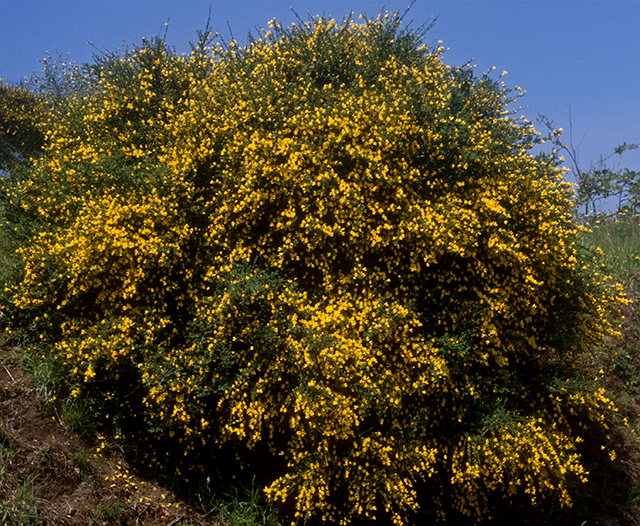 Ejemplar de Cytisus insularis en su apogeo vital.